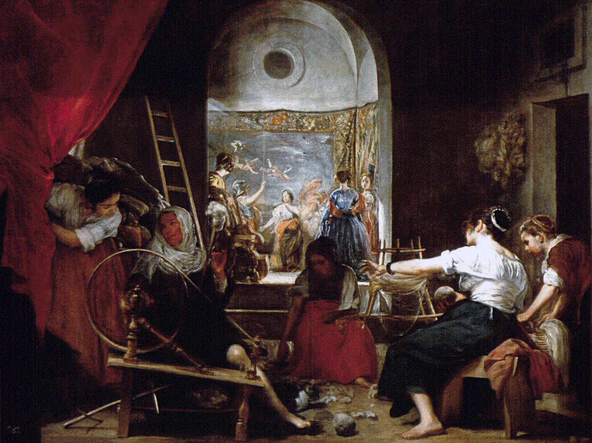 Das Werk nimmt Bezug auf den Moment, in dem die Weberin Arachne (gr. 'Spinne') von der Göttin Athene bedroht wird, diese zu verwandeln, weil sie im Wettstreit mit der Göttin in Sachen Webkunst prahlt (im Fond). Im Vordergrund die Alltagsszene von spinnenden Frauen zur damaligen Zeit.